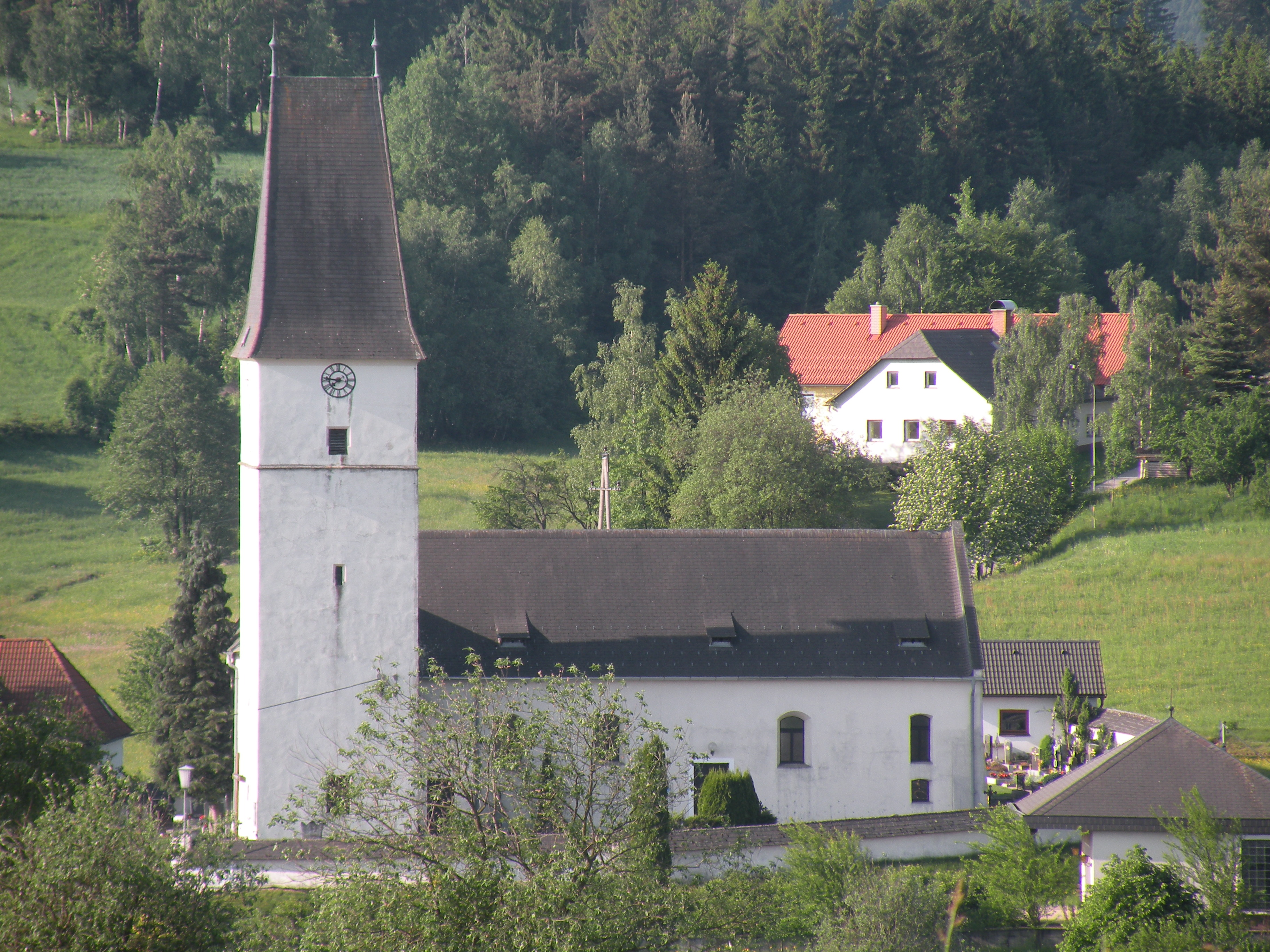 Kirche in Griesbach, Gemeinde Groß Gerungs, Bezirk Zwettl, Niederösterreich